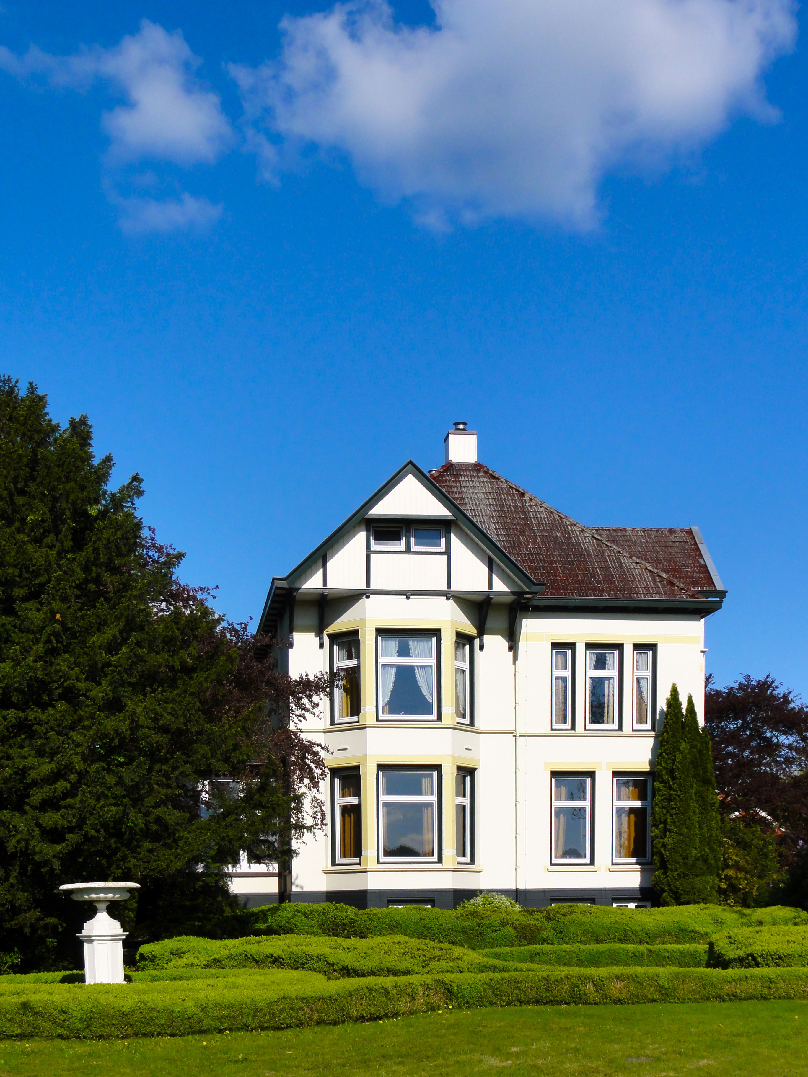 Renteniersvilla Verlengde Hoofdweg 3 Nieuw-Beerta